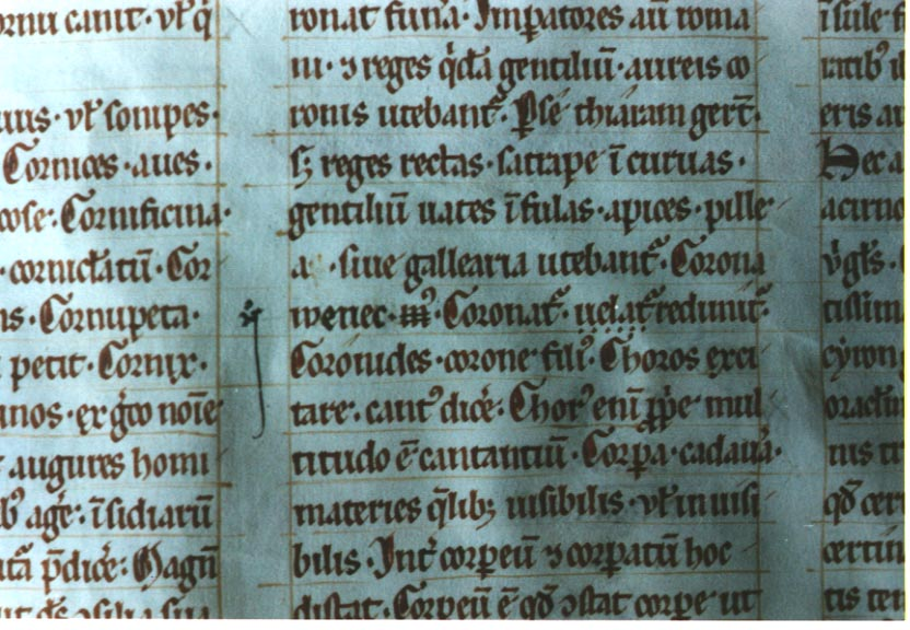 Поддельная глосса «Věnec» в рукописи Mater Verborum. В печатном экземпляре вместо этой глоссы значится: coronamus velamus, в рукописи, видимо, – coronam9 uelam9. Corona осталось, из m9 сделано w, e приписано, из la, которою частично выскоблено, сделано c, m9 осталось, но зачеркнуто. На фотографии хорошо видна разница в цвете старых и новых чернил.